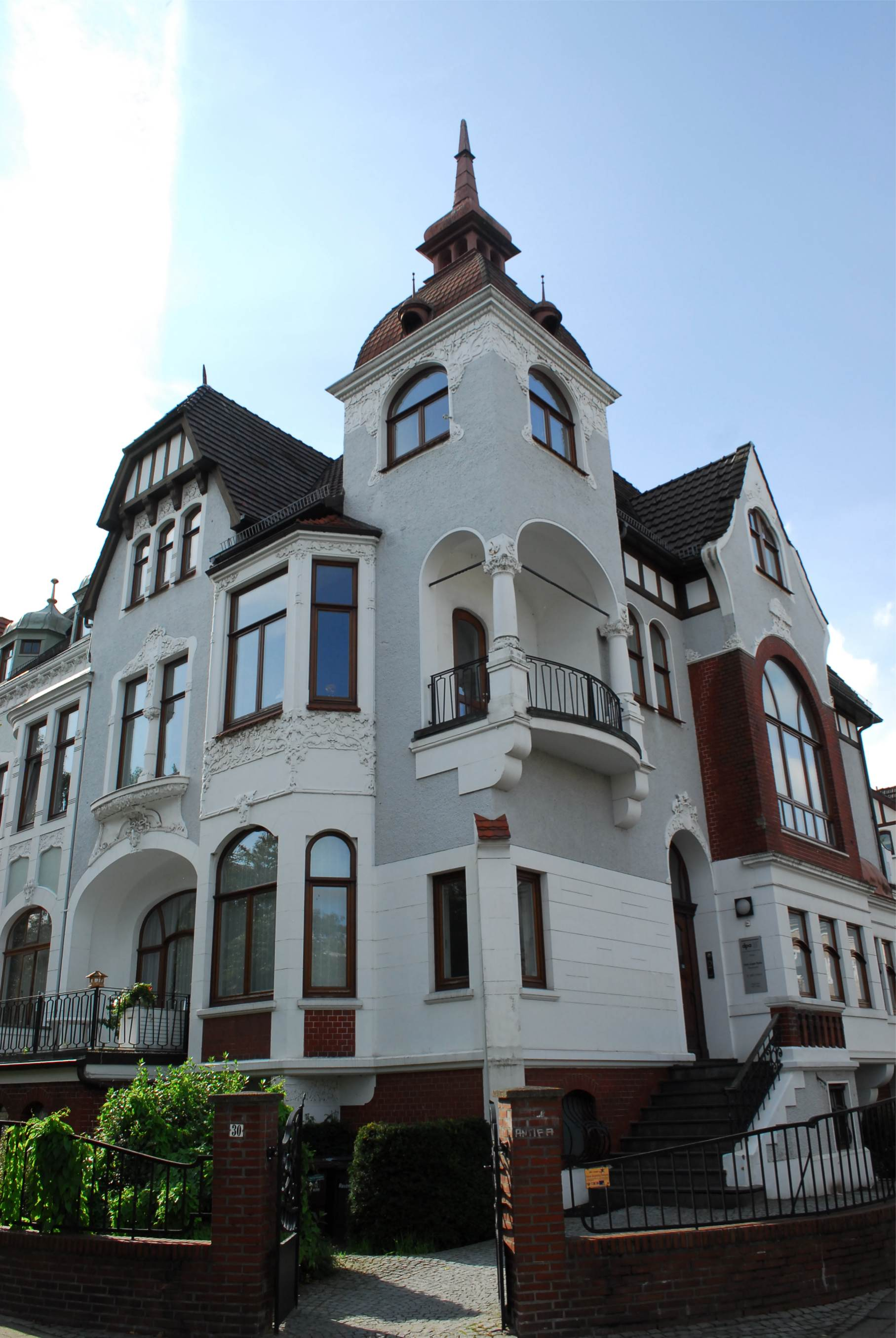 Villa Sowerbutts in Bremen, Parkallee 30 / Goebenstraße.Das abgebildete Objekt ist ein geschütztes Kulturdenkmal in der Freien Hansestadt Bremen, mit der Nr. 0995 beim Landesamt für Denkmalpflege registriert.